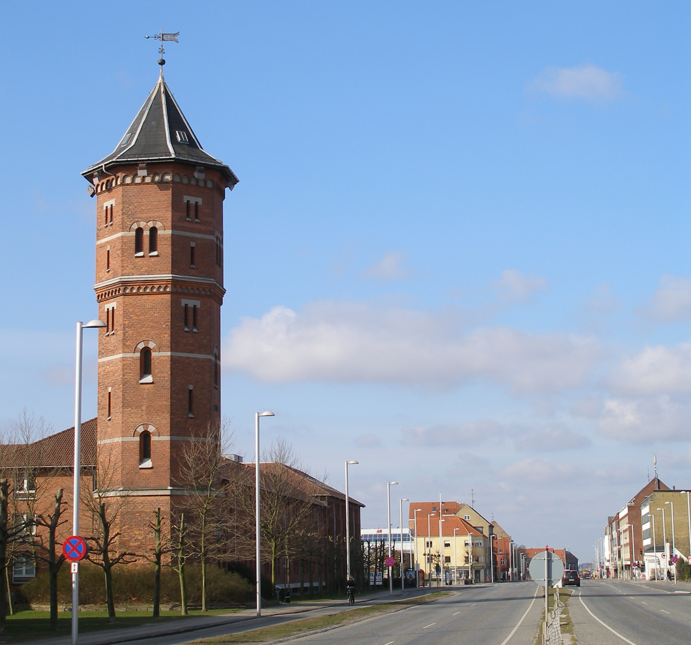 Det gamle vandtårn på Hovedgaden i Glostrup